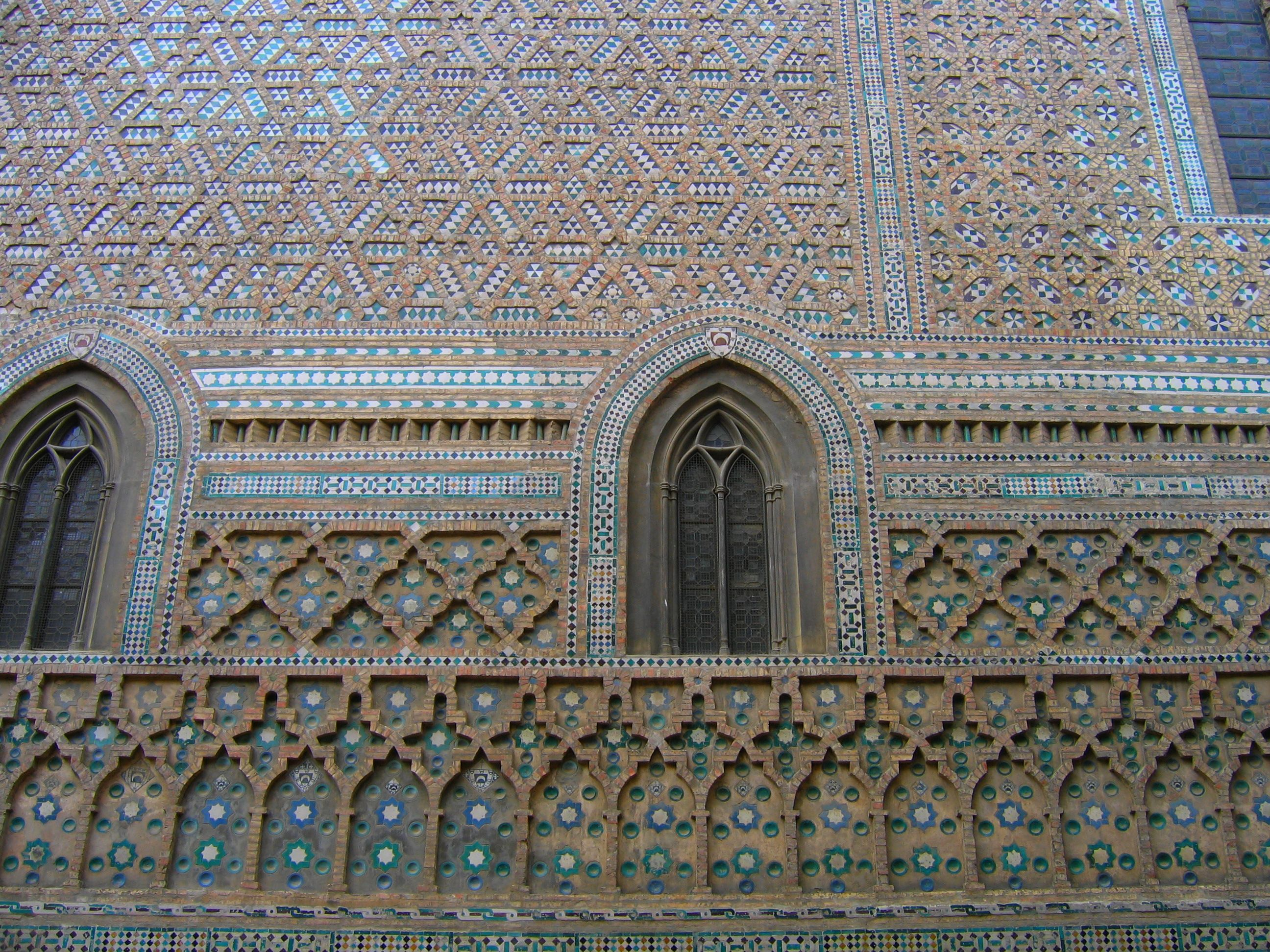 Architecture mudejar, Cathédrale de la Seo Saragosse, Aragon, Espagne